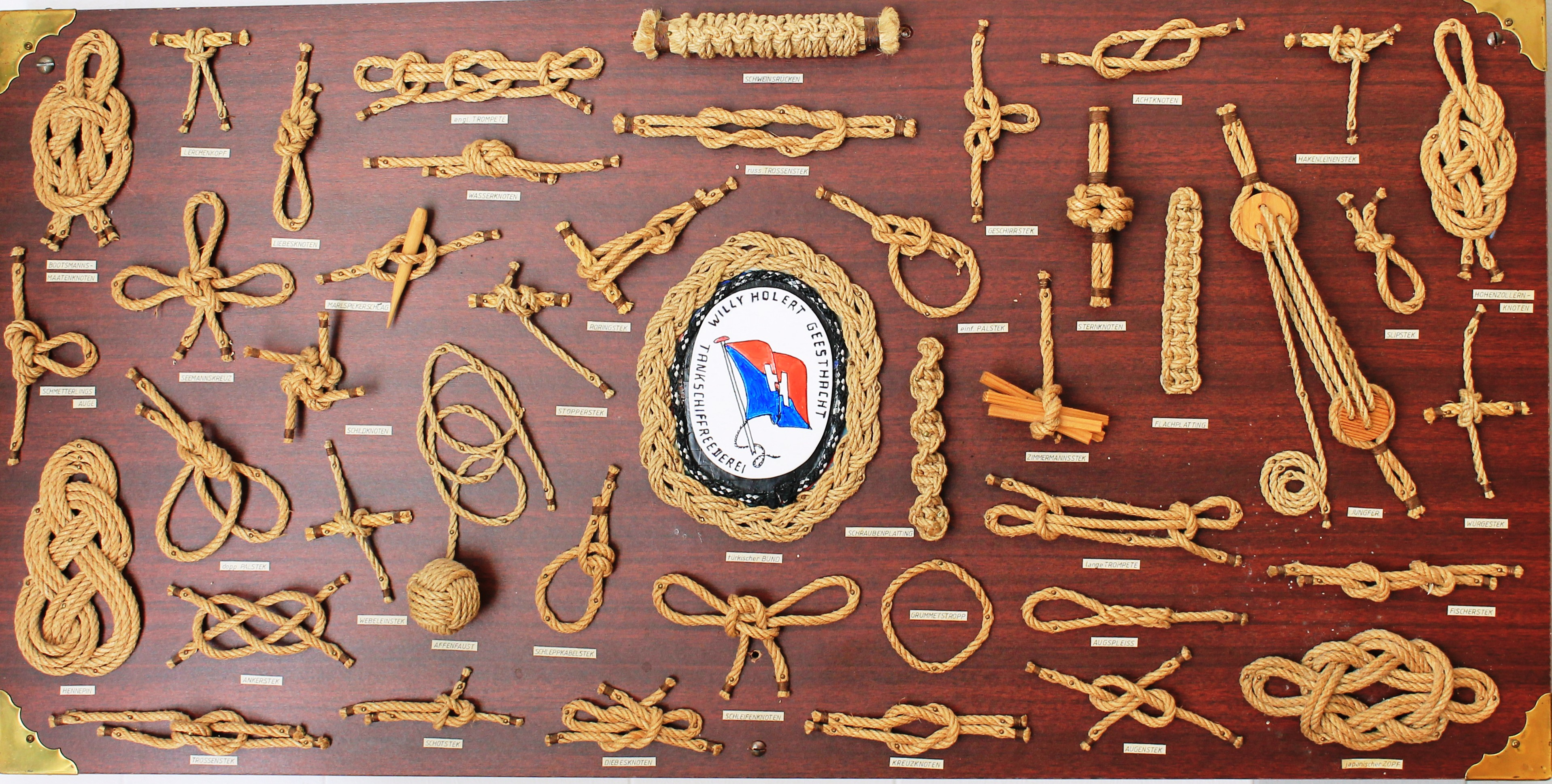 Elbschiffahrtsarchiv, Knotentafel der Reederei Willy Holert